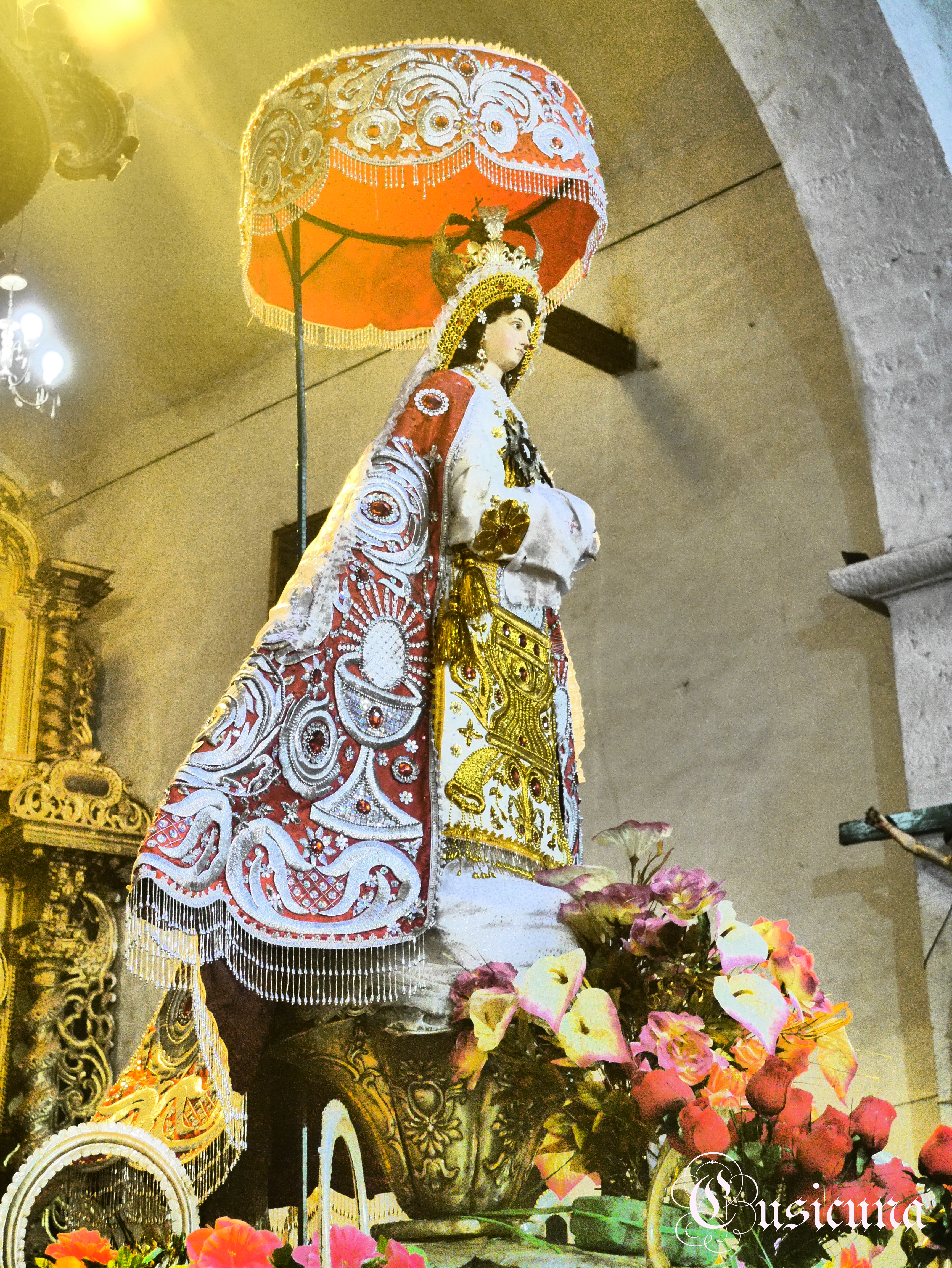 Virgen Reina de los Angeles, patrona de la Comunidad de Urquillos